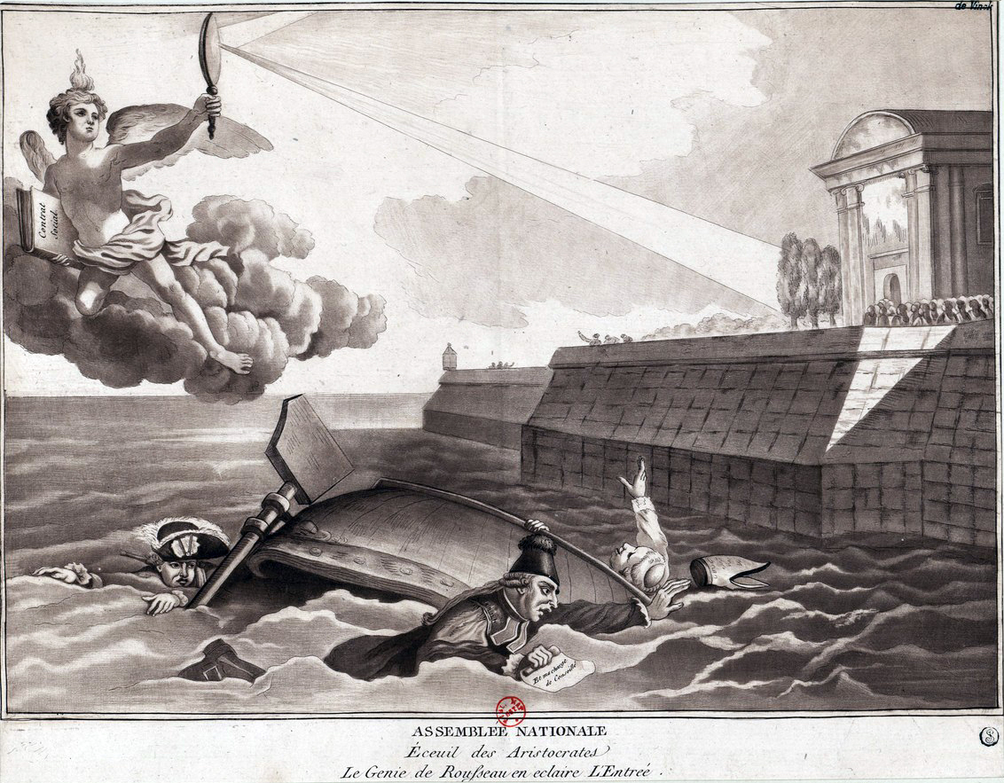 Estampe